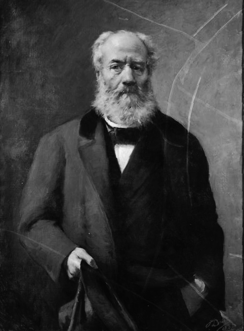 Filósofo e Matemático Português, Professor da Academia Politécnica do Porto entre 1850 e 1883. (Óleo da Autoria do pintor J. Brito)